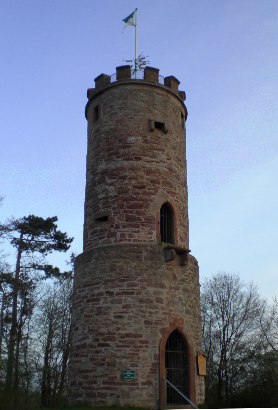 Wartturm bei Buchen, Neckar-Odenwald-Kreis, Baden-Württemberg